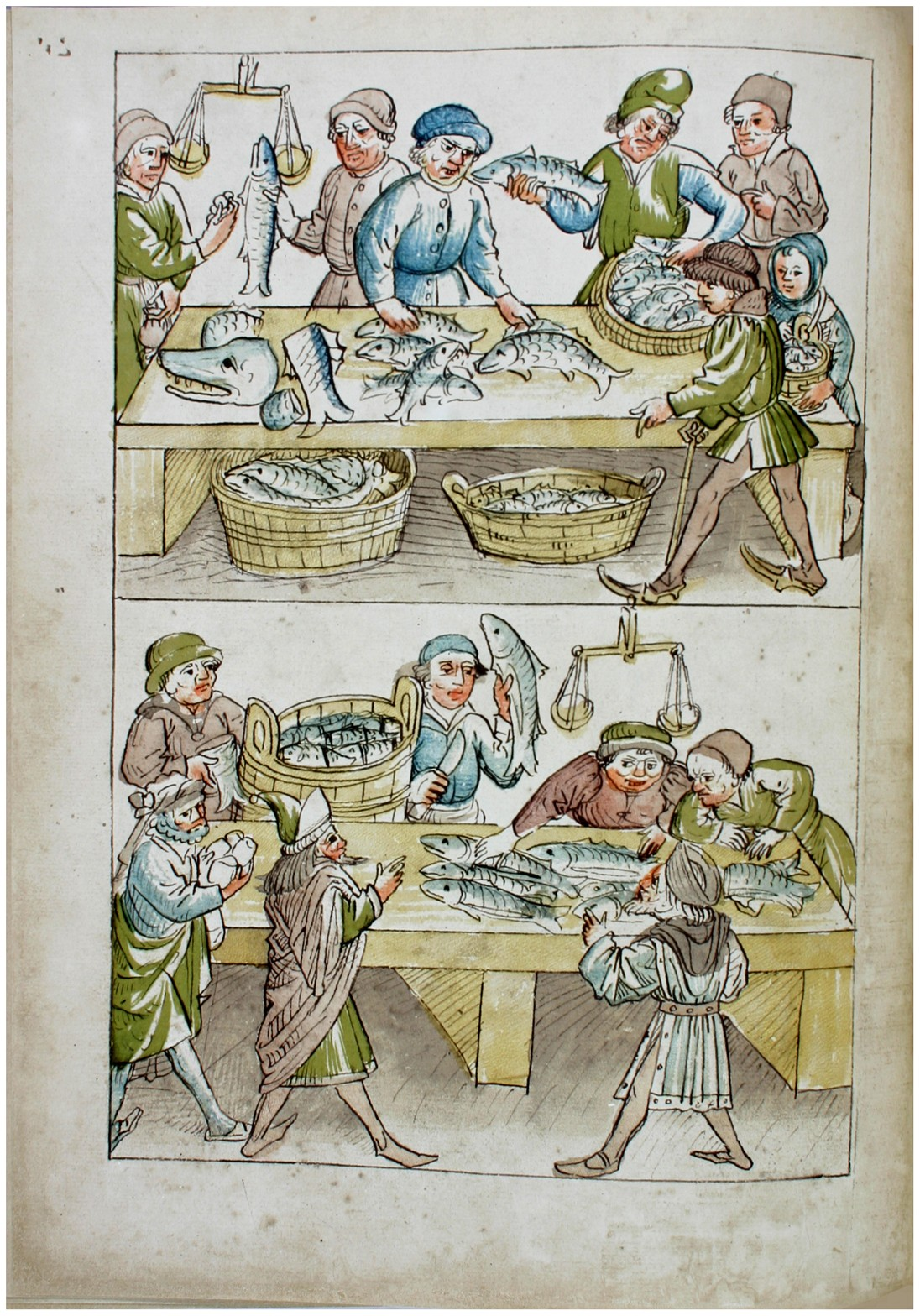 Rosgartenmuseum Konstanz, Hs. 1, Richental: Konzilschronik. In: Feger, Otto (Bearb.): Ulrich Richental: Das Konzil zu Konstanz. Faksimile. Starnberg - Konstanz 1964. Fol. 24v